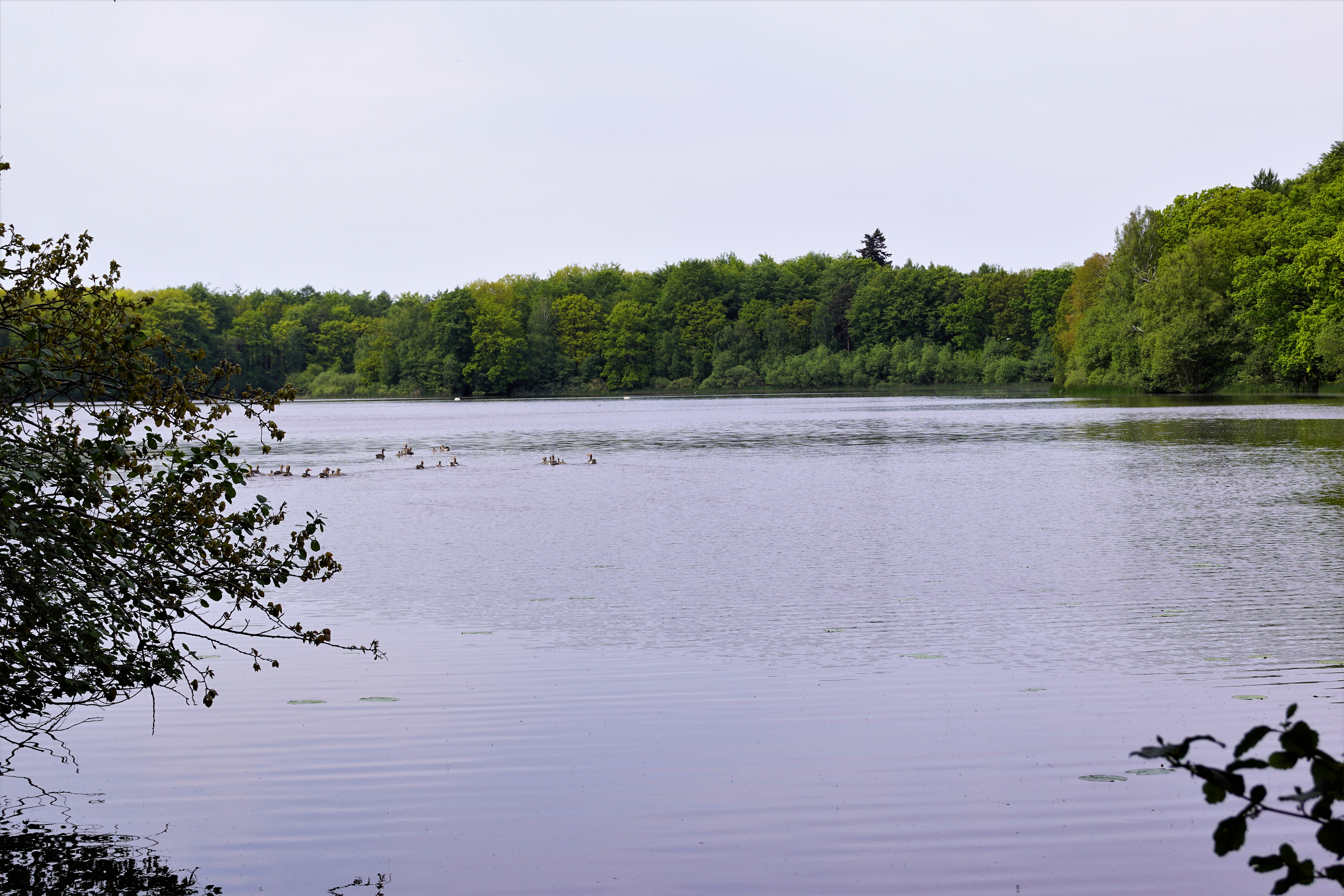 Bøgeholm Sø set mod vest